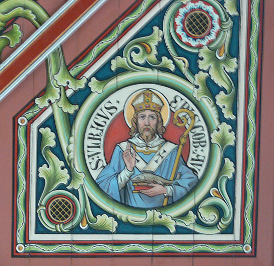 Spätnazarenisches Deckengemälde detail